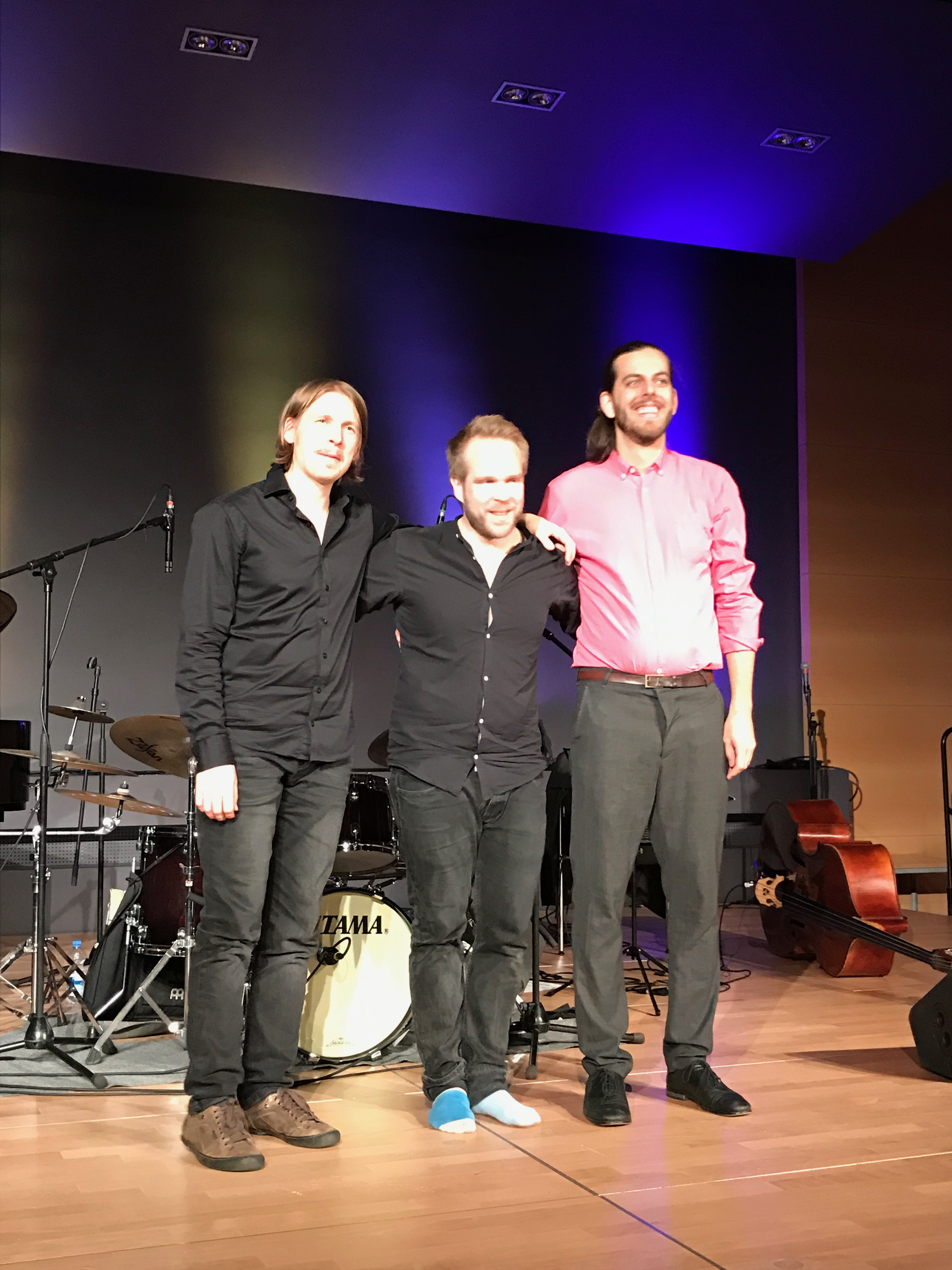 Emil Brandqvist Trio 2016